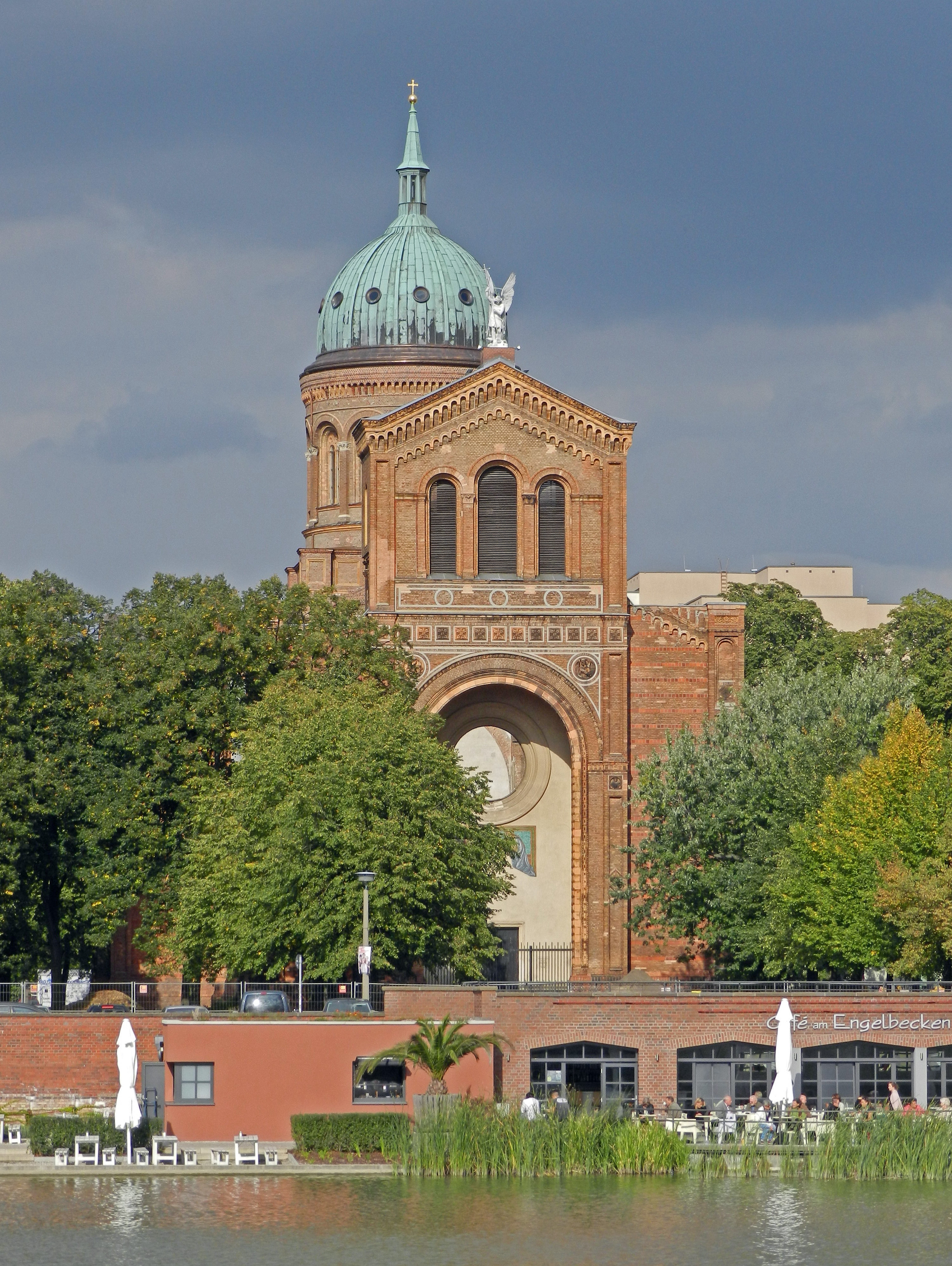 Michaelkirche, Michaelkirchplatz, Berlin-Mitte.